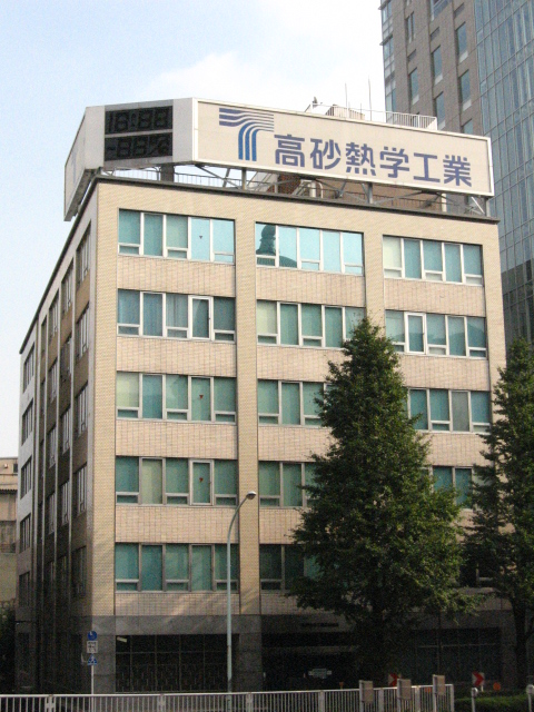 Takasago-Netsugaku Bildings.